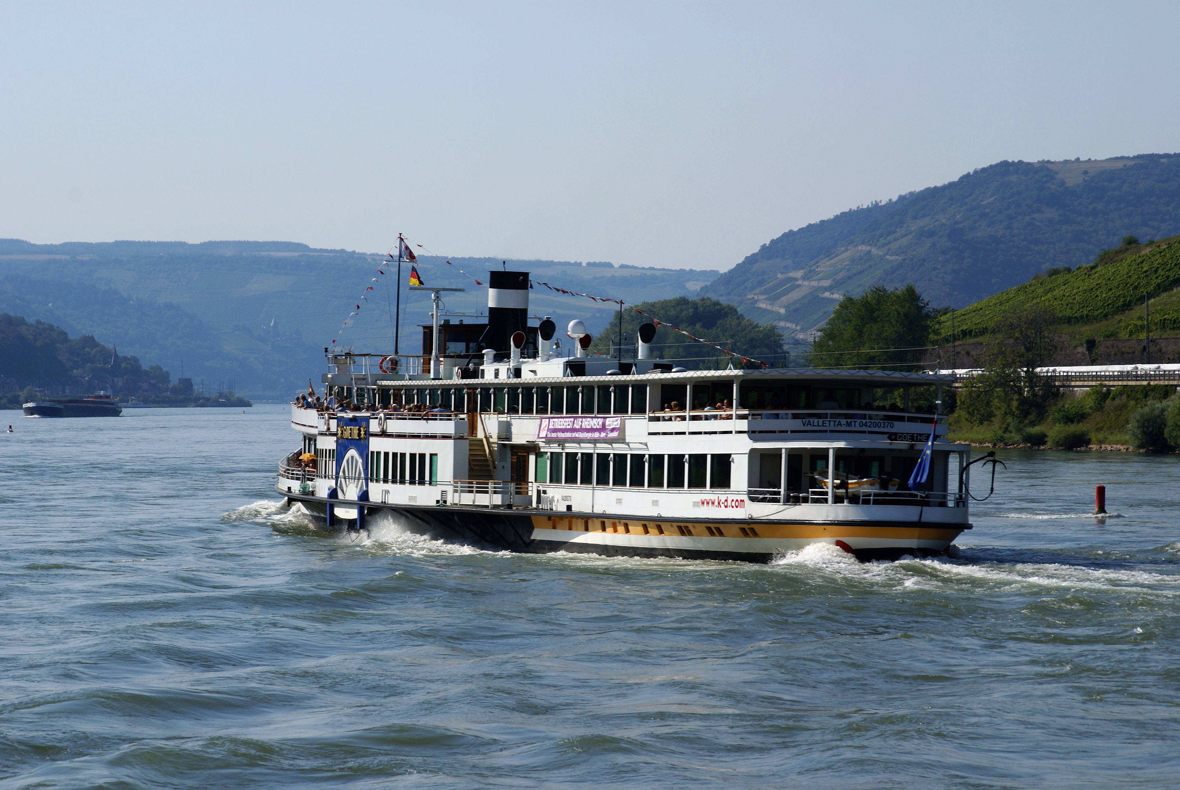 Raddampfer Goethe auf Fahrt auf dem Rhein bei Schafhof, Hessen.